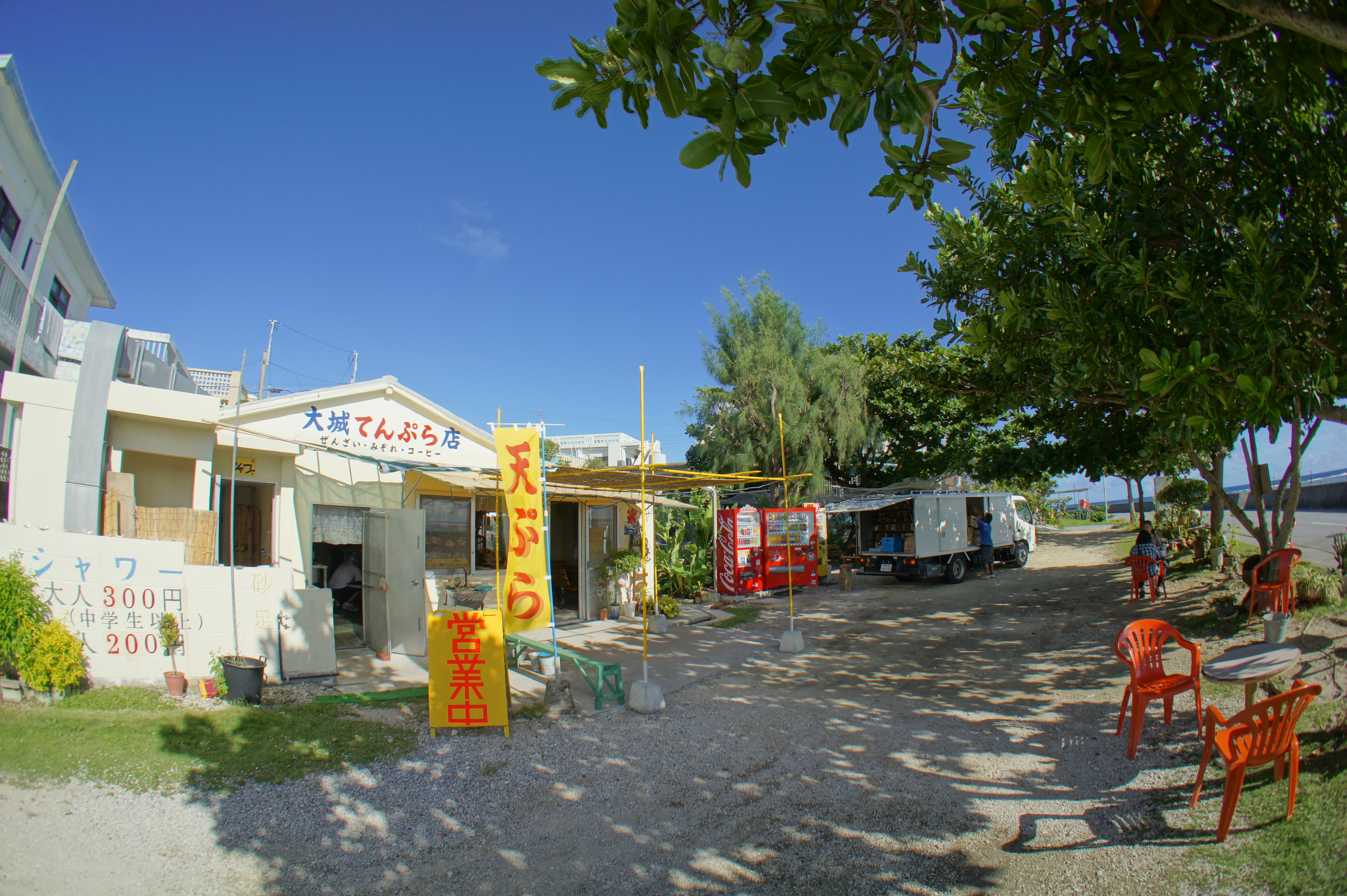 大城てんぷら店（南城市、奥武島）